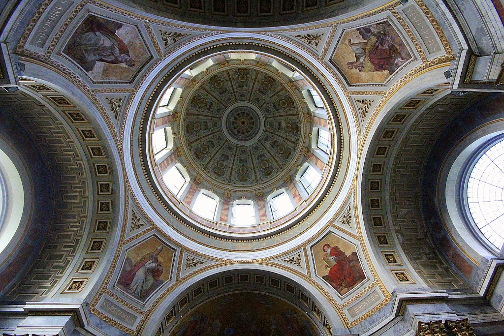 kupola